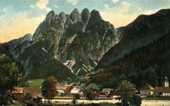 Cave del Predil/Raibl/Rabelj rond 1915 met de berg Fünfspitz. PD vanwege ouderdom.